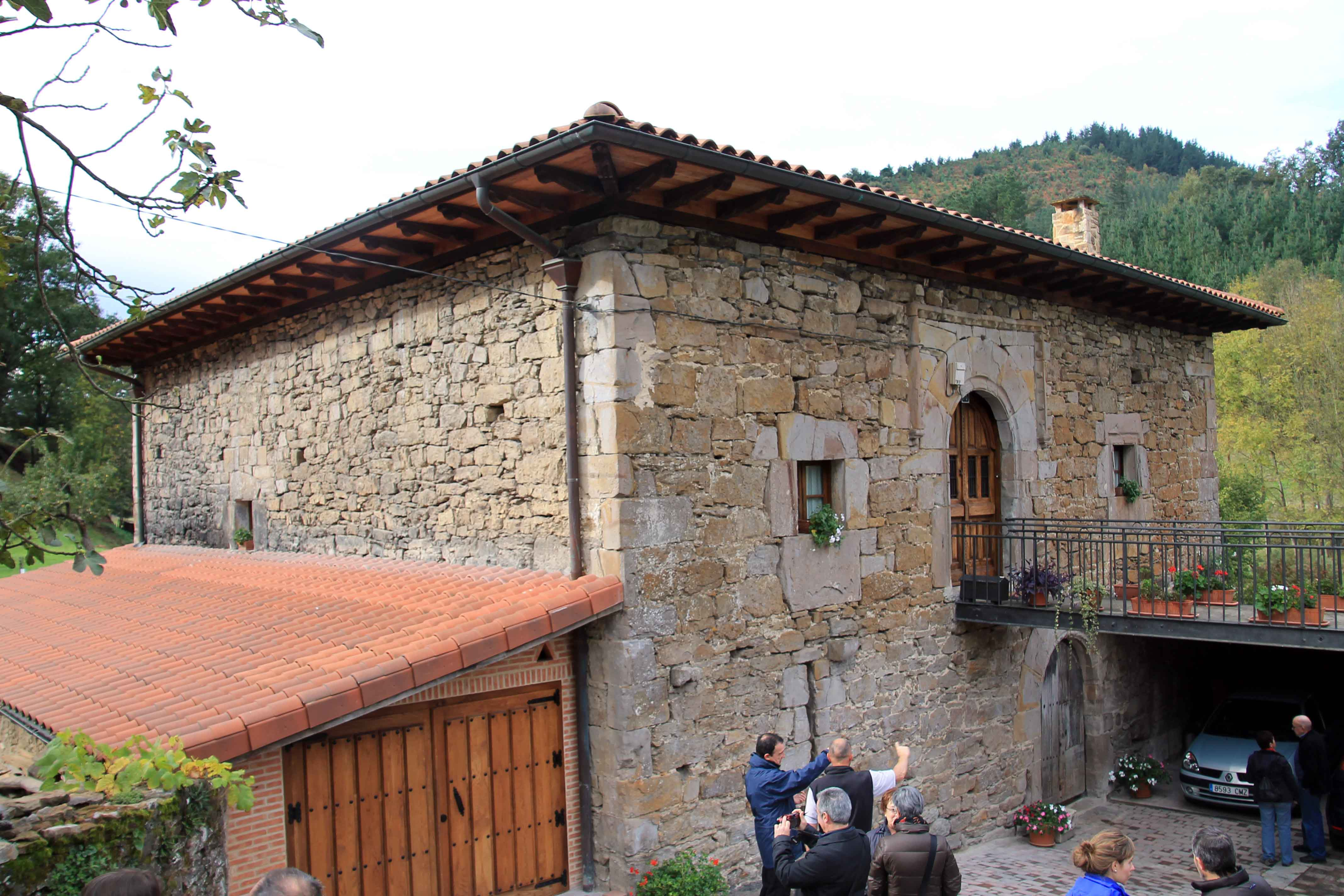 Ureta dorretxea